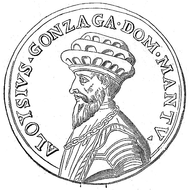 Luigi Gonzaga (Ludovico I) (1268-1360), primo capitano del popolo di Mantova.